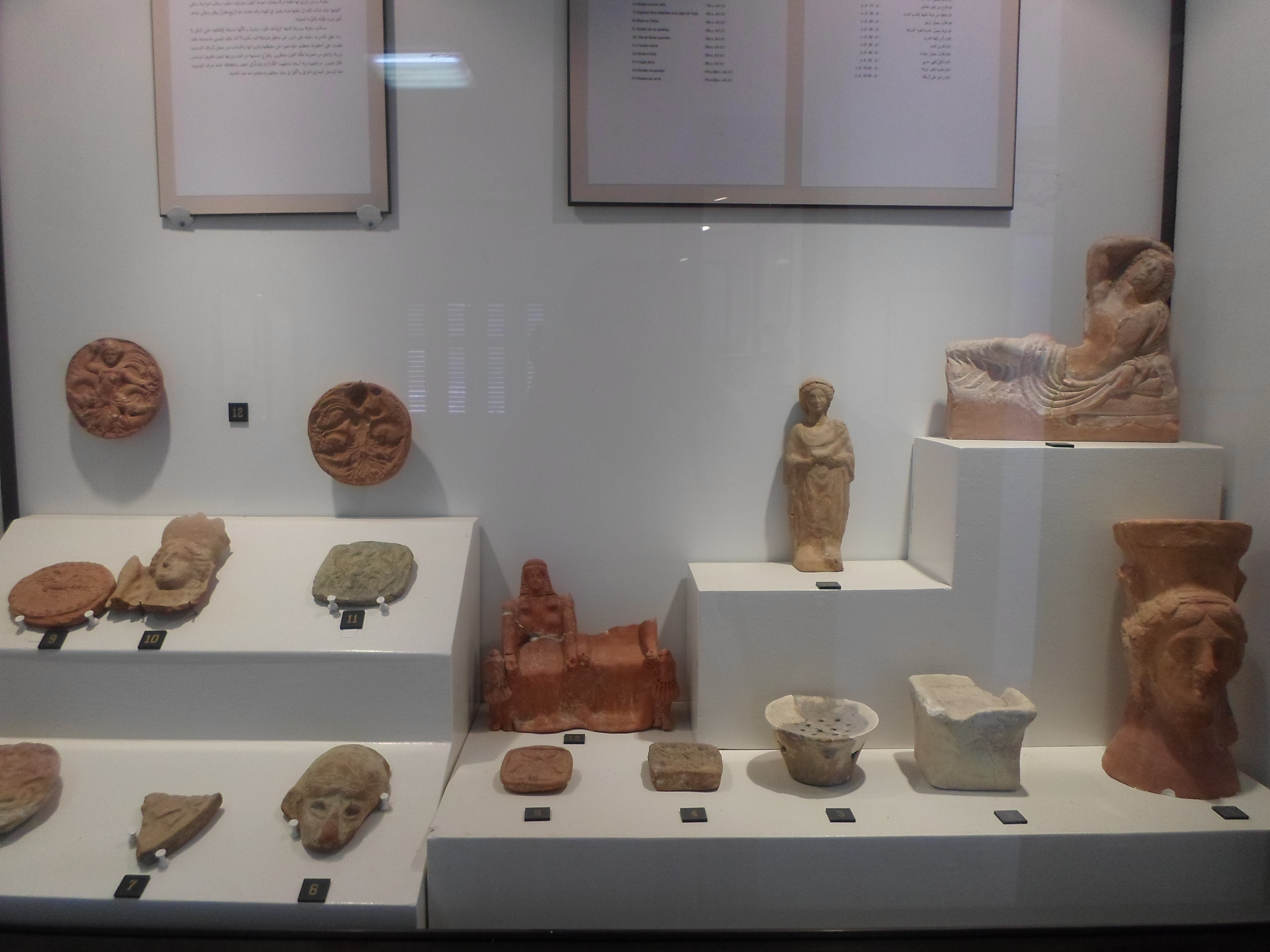 Site archéologique de Kerkouane